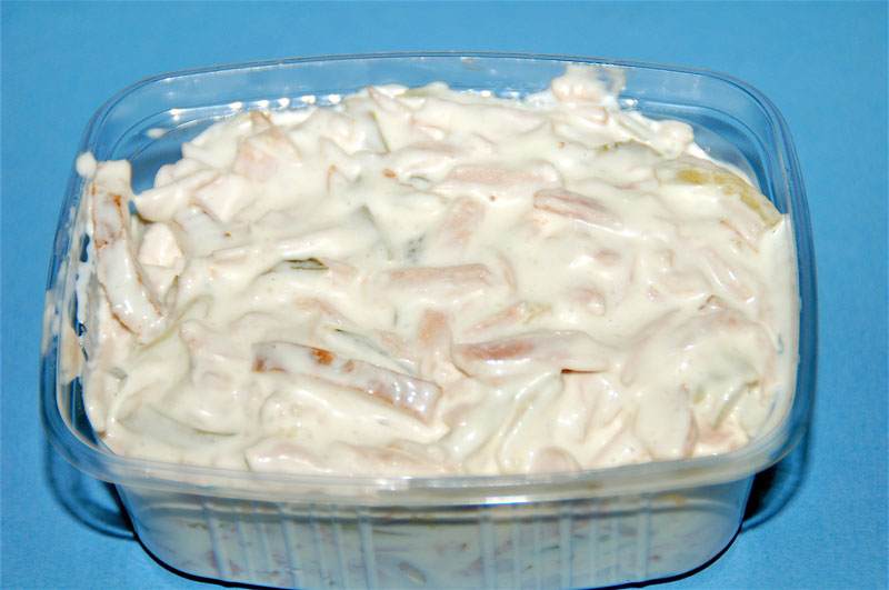 Fleischsalat